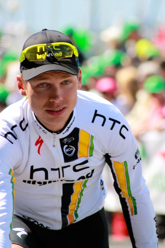 Tony Martin à la sortie du podium